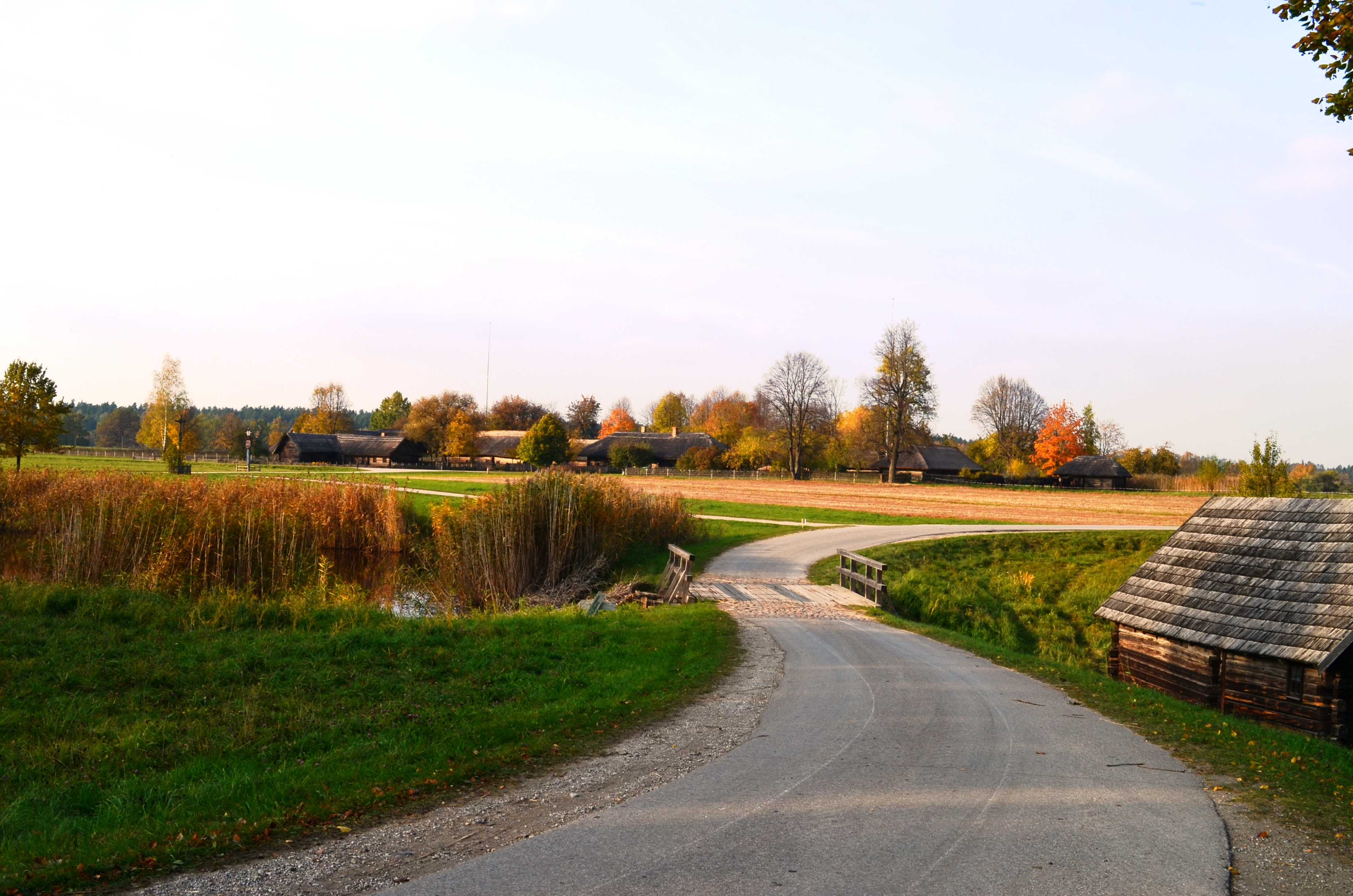 Aukštaičių kaimas, Rumšiškių muziejus